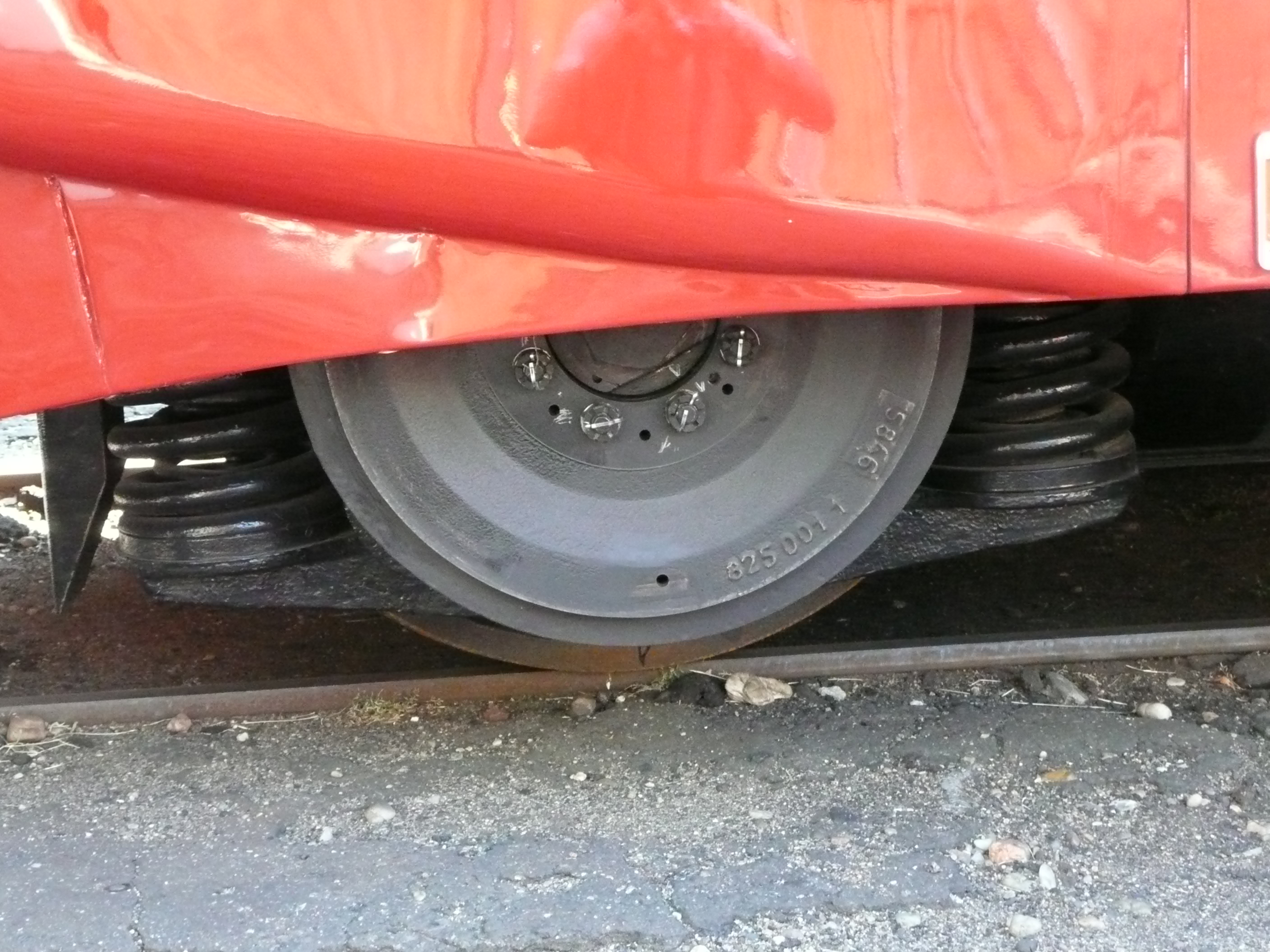 Trommelbremse des M 260 001